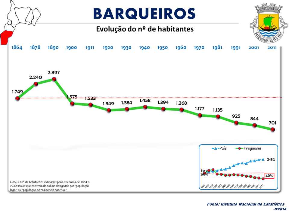 Evolução da População 1864 / 2011